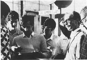 Al circolo "Che Guevara".